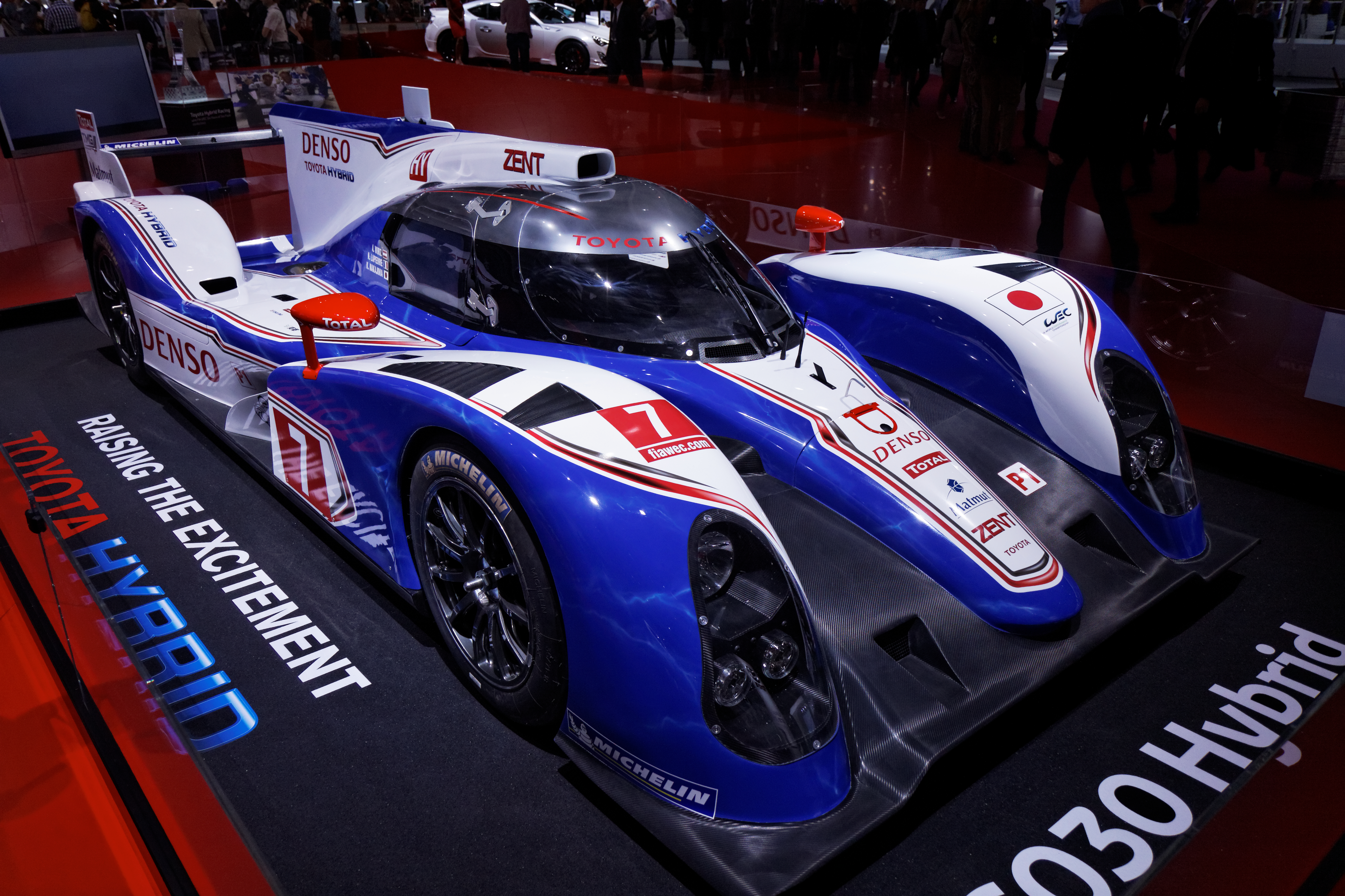 Une Toyota TSO30 Hybrid présentée lors du Mondial de l'Automobile de Paris 2012.